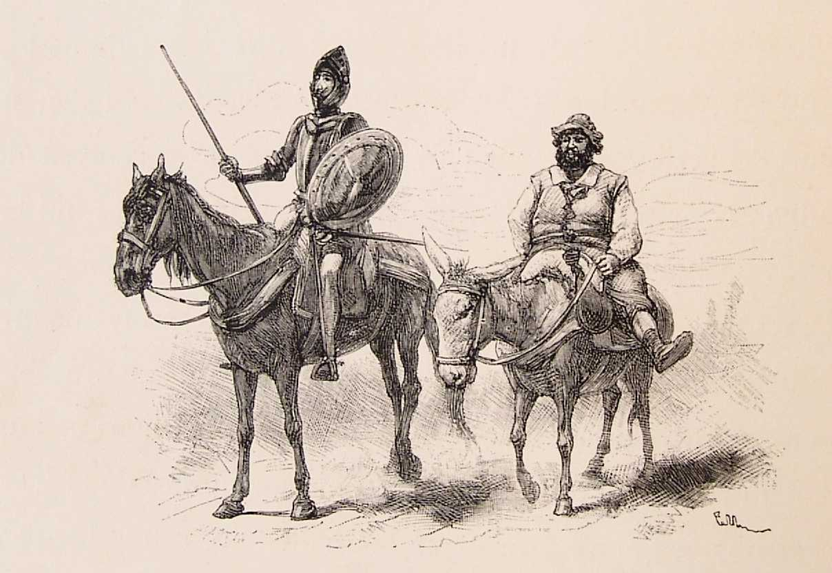 "Don Quixote" — Edición anotada por Nicolás Díaz de Benjumea e ilustrada por Ricardo Balaca (1880-1883). 202_261_quijote_cap57